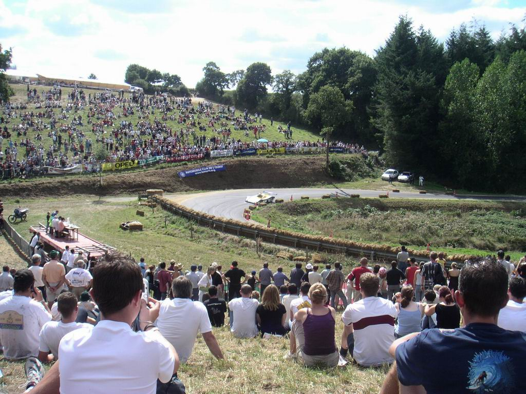 Course de Côte de Saint-Gouéno (22) : epingle à cheveux ; le "fer à cheval". Prise de vue personnelle 2005 utilisateur:Philiwik